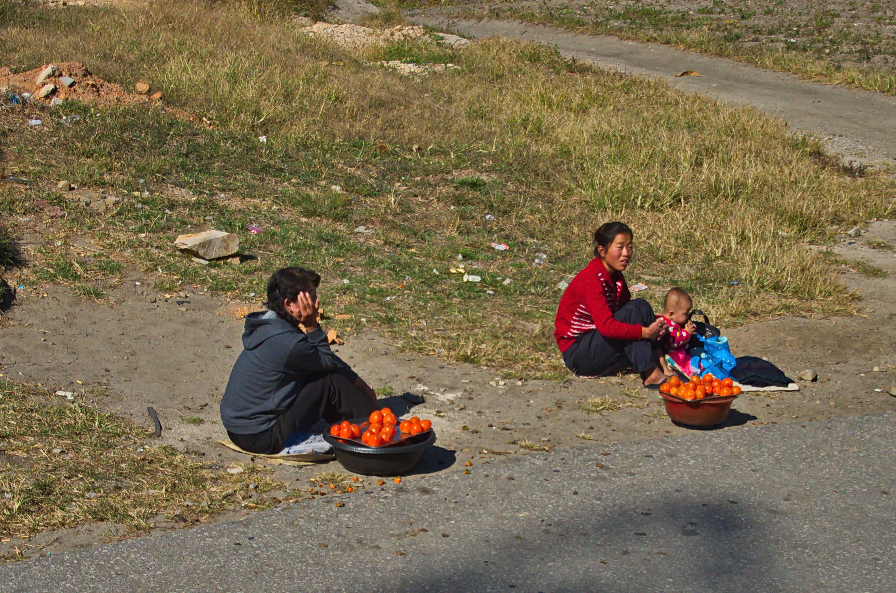 Nordkorea 2015 - von Käsong nach Pjöngjang